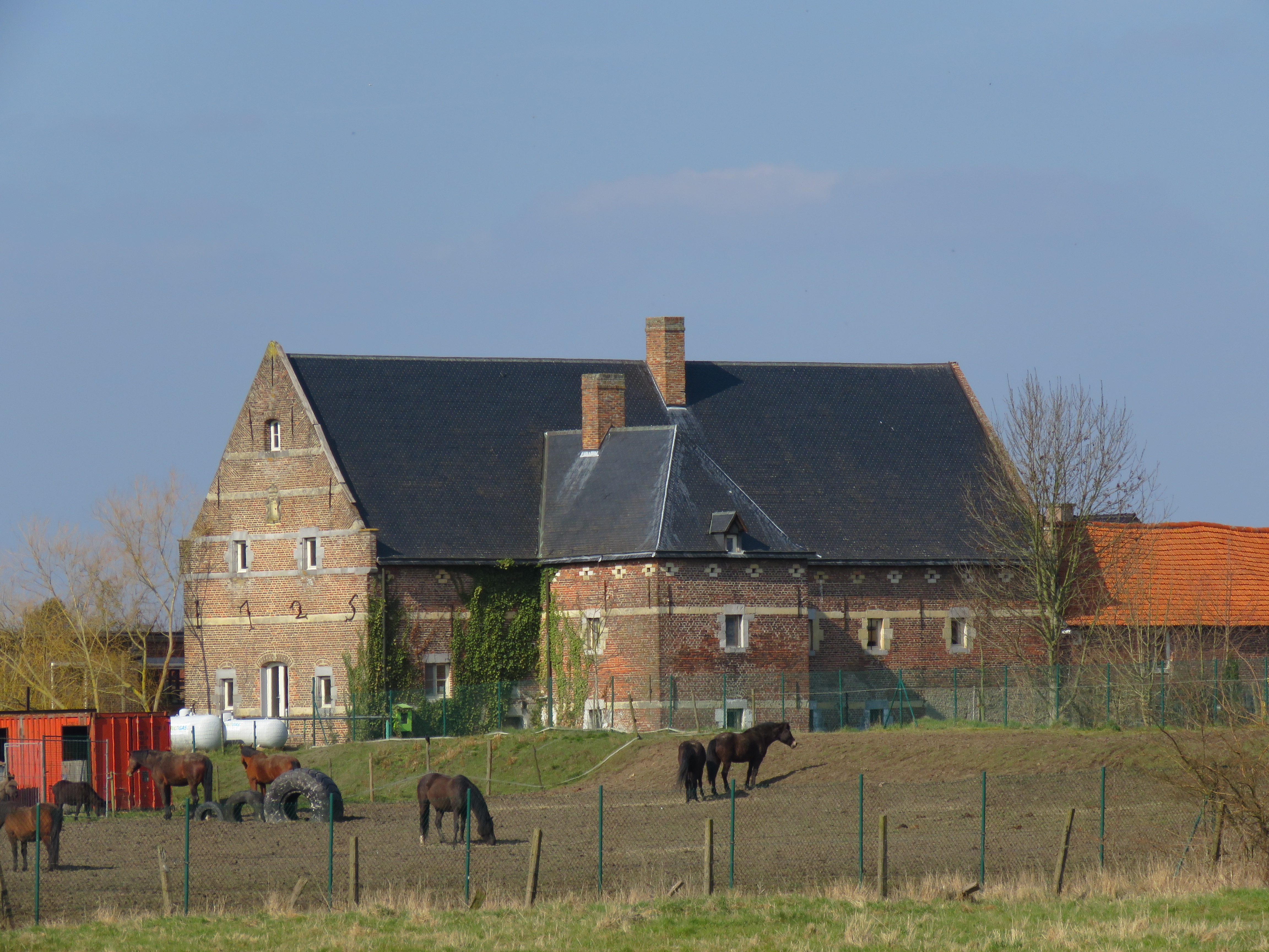 Voormalige molen op Molenbeek in Sint-Truiden